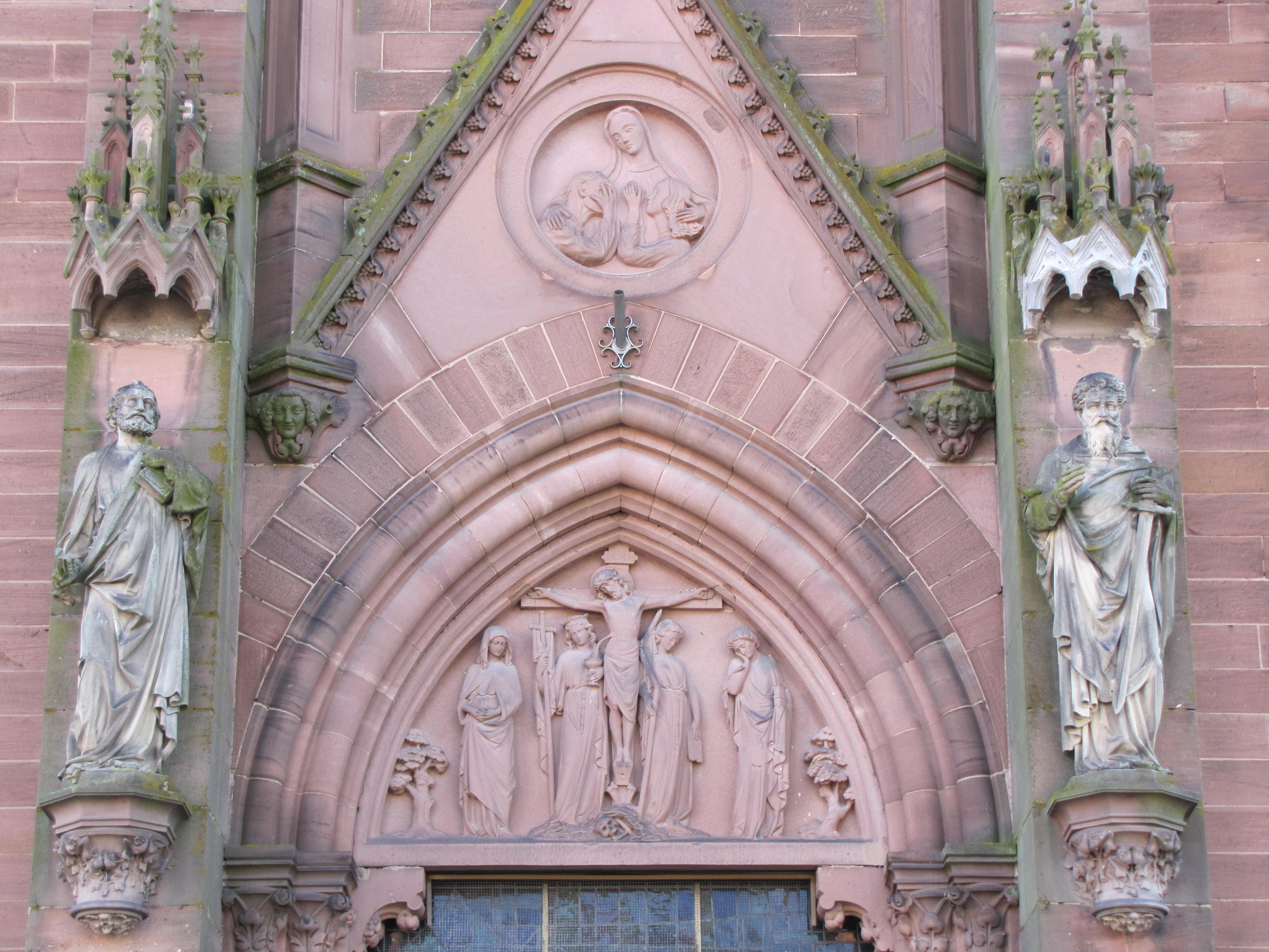 Alsace, Bas-Rhin, Haguenau, Basilique Notre-Dame-des-Douleurs de Marienthal (ancien Prieuré des Guillemites) (IA00062022). Portail néo-gothique (vers 1866)